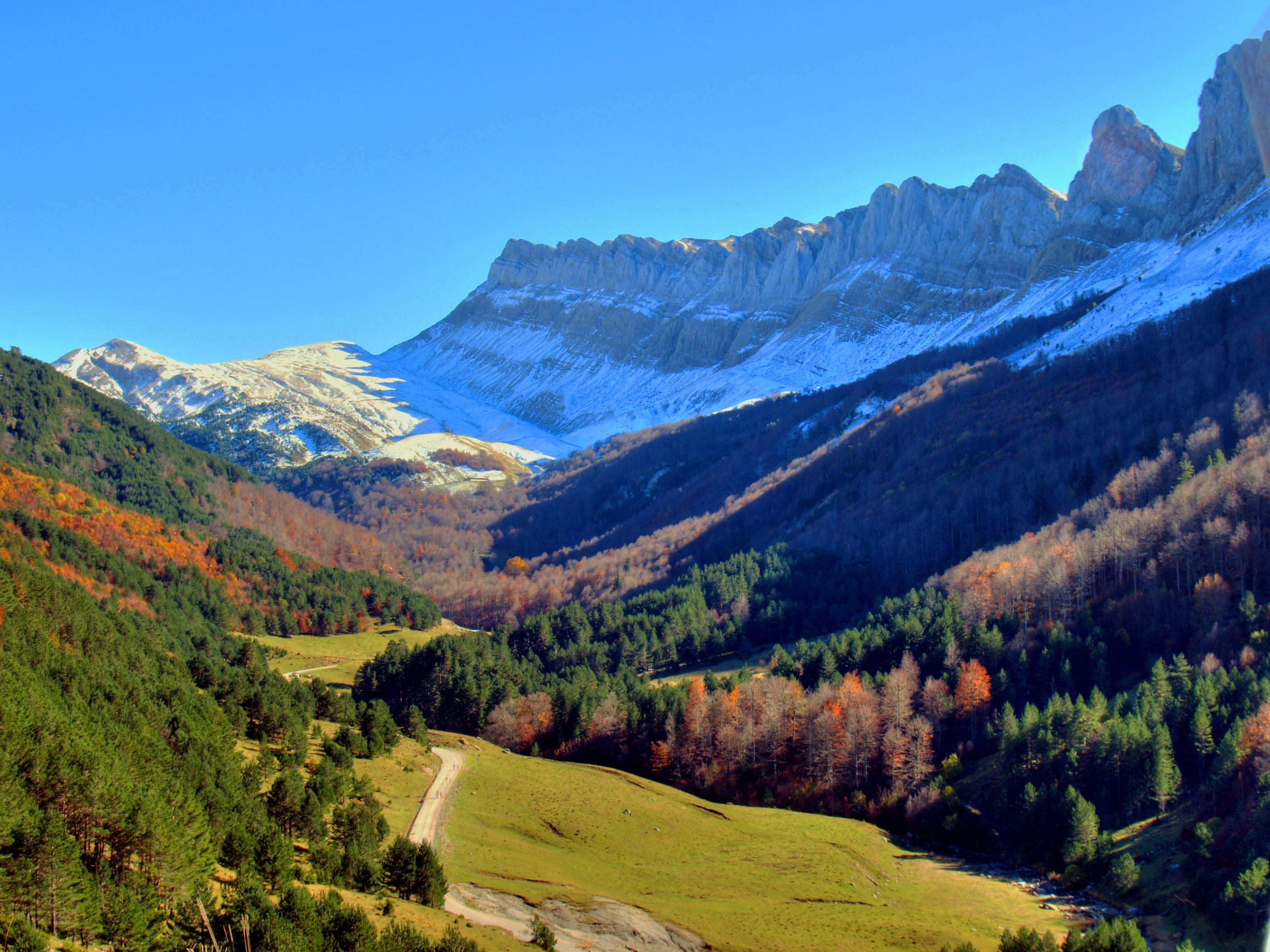 Vista del valle de Zuriza, con los Alanos a la derecha. Achar de Alanos en primer plano.